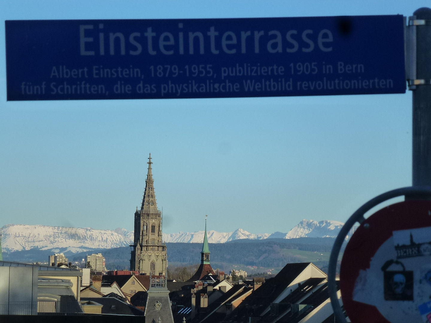 Einsteinterrasse in Bern